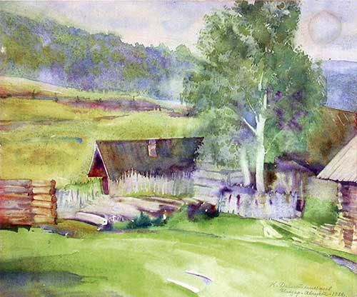 картина художника Девлеткильдеева Касима (1887—1947). Мотив Инзерского завода